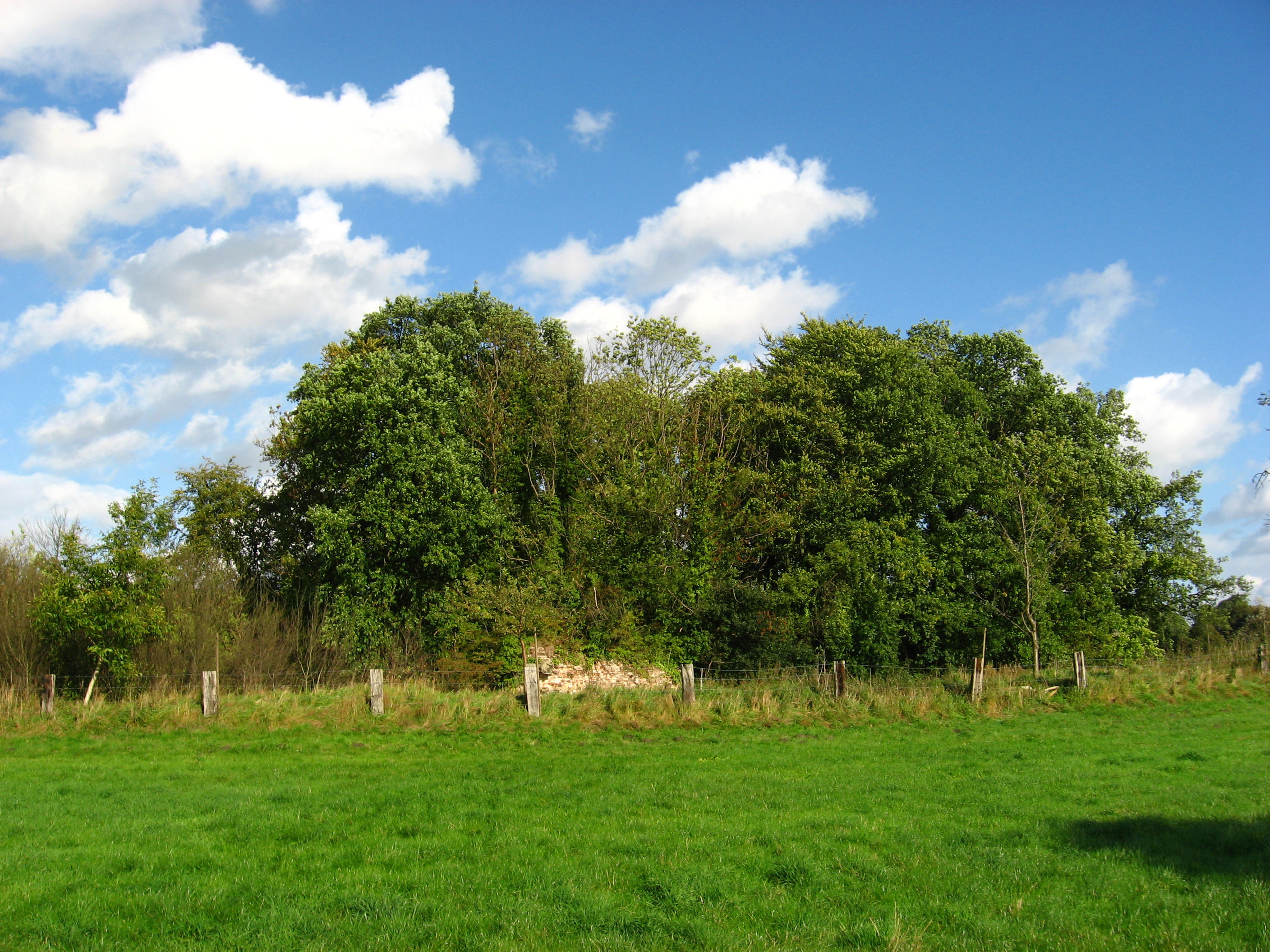 Ruine Rauschenburg, Ansicht von Südwesten